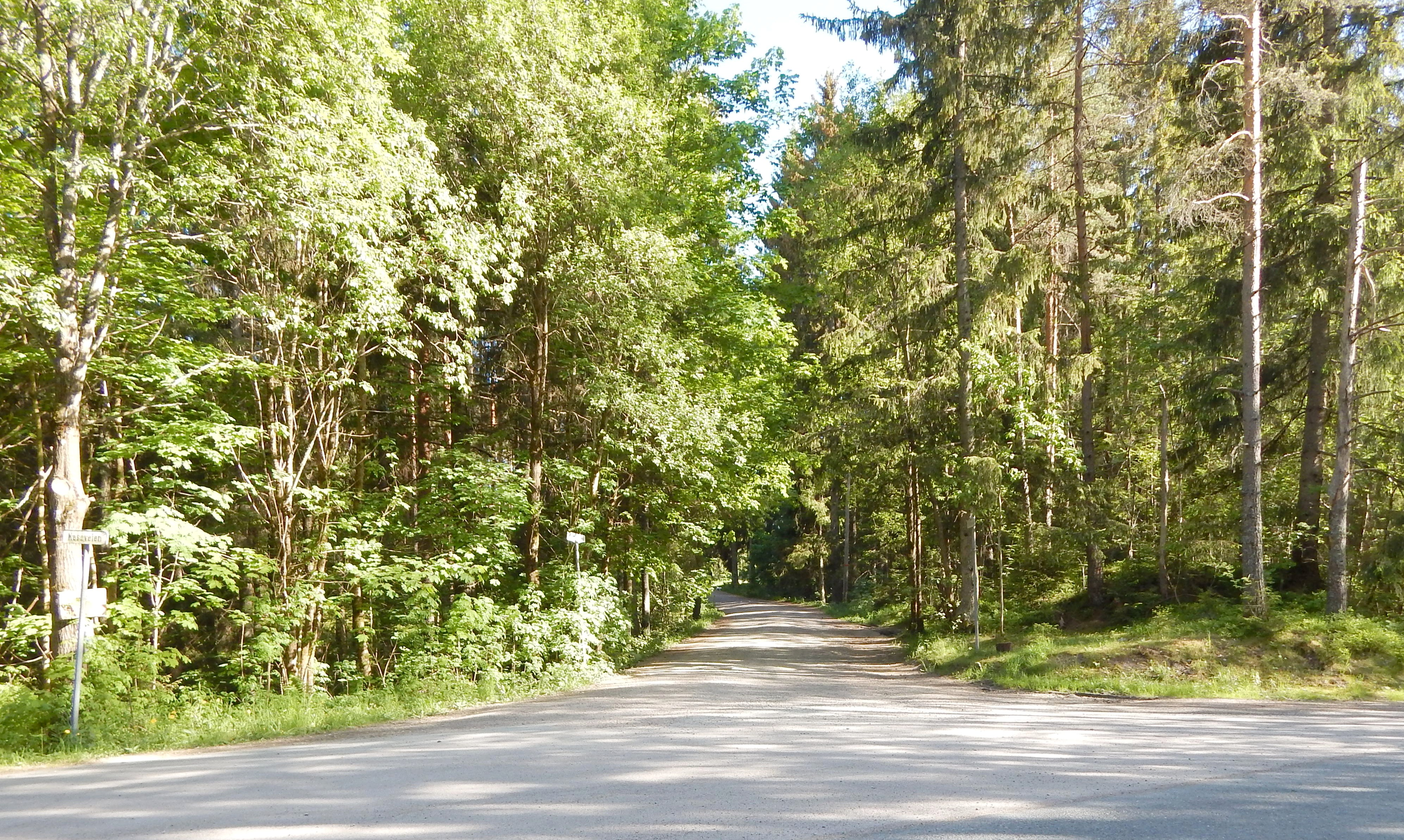 Kallerudveien sett fra Gamle Maridalsvei